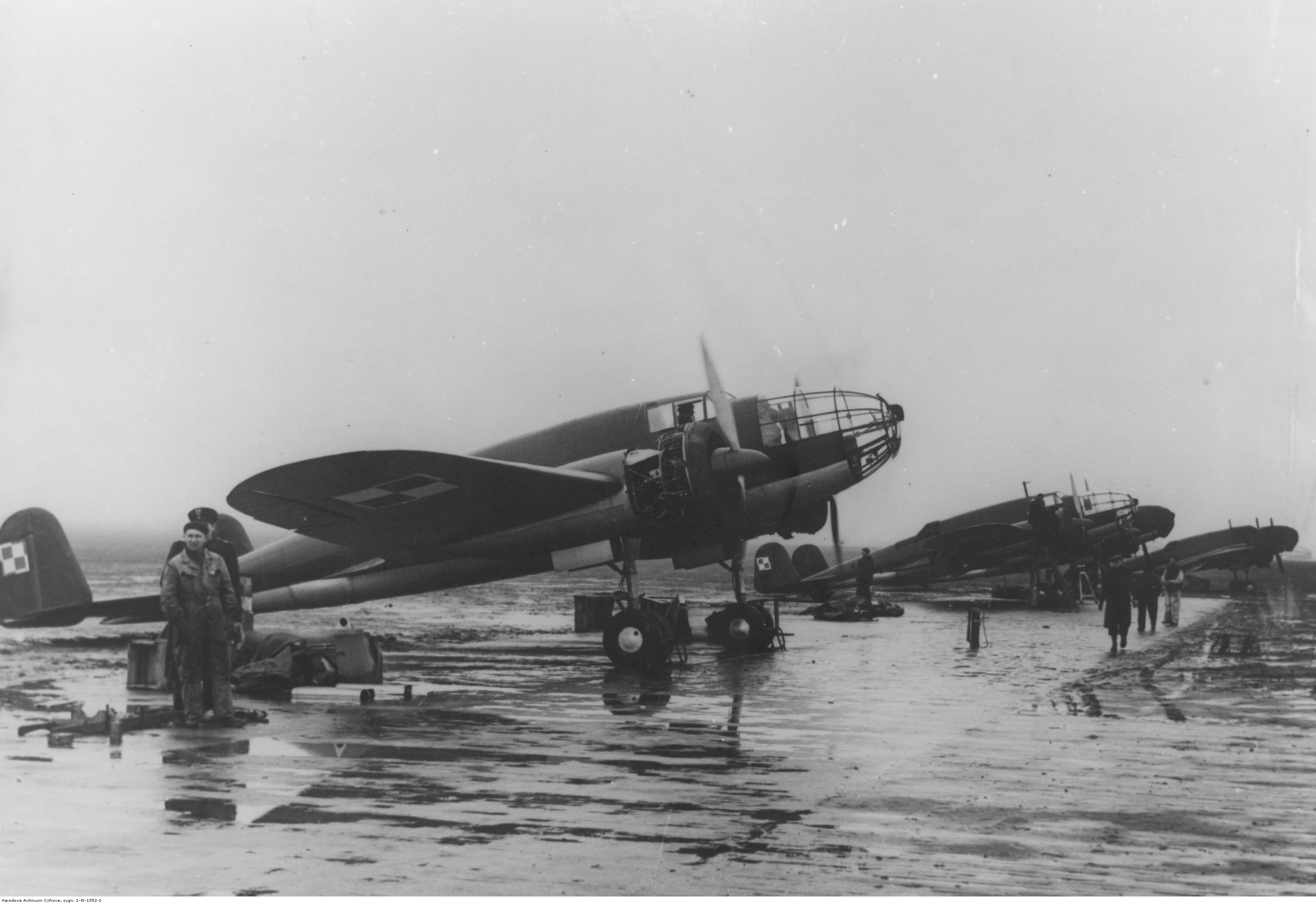 Samoloty PZL.37 Łoś na lotnisku.